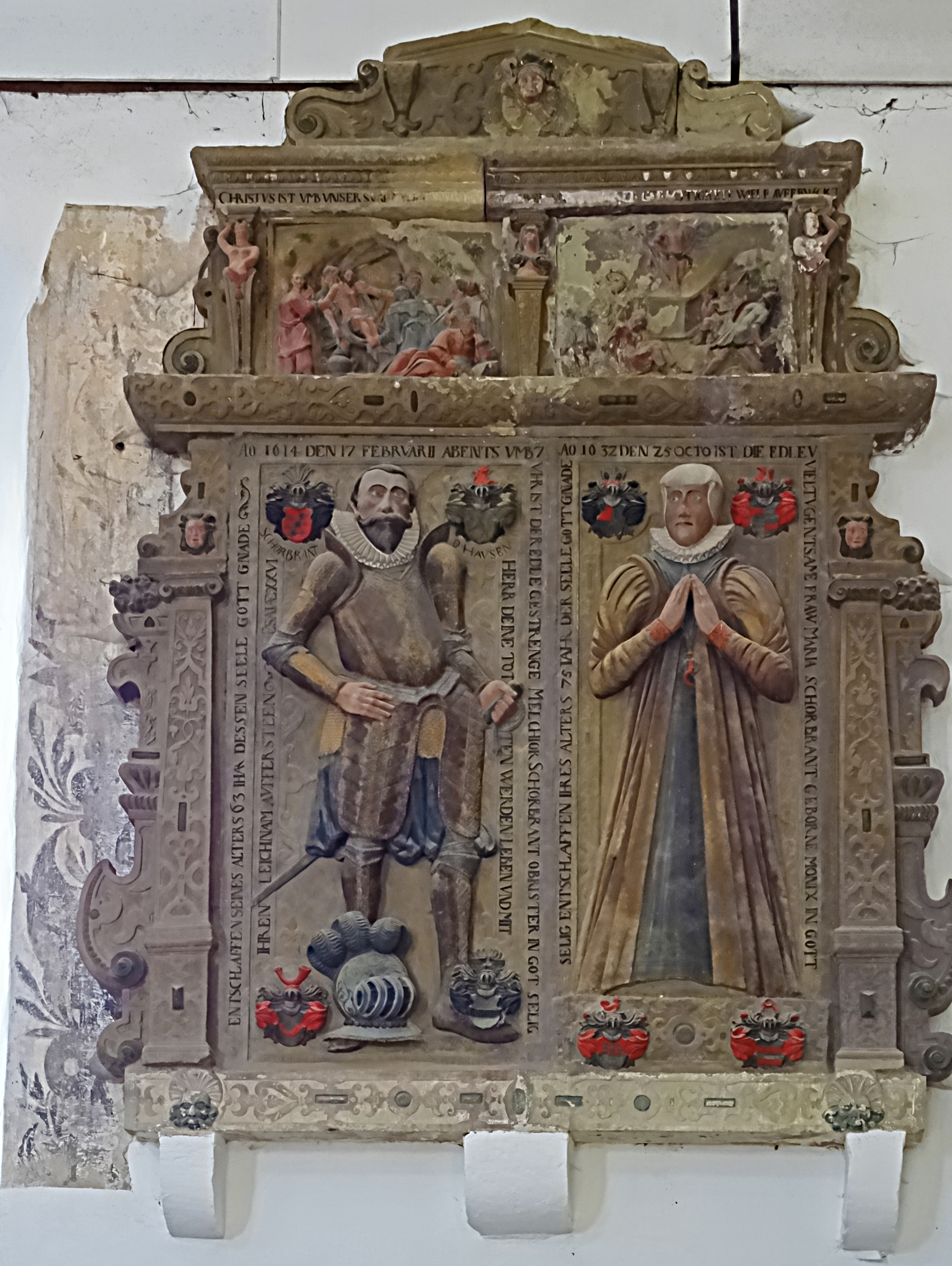 Doppelepitaph für Melchior + Maria Schorbrant 1614 bzw. 1632 in St. Bonifatius, Kirchheilingen